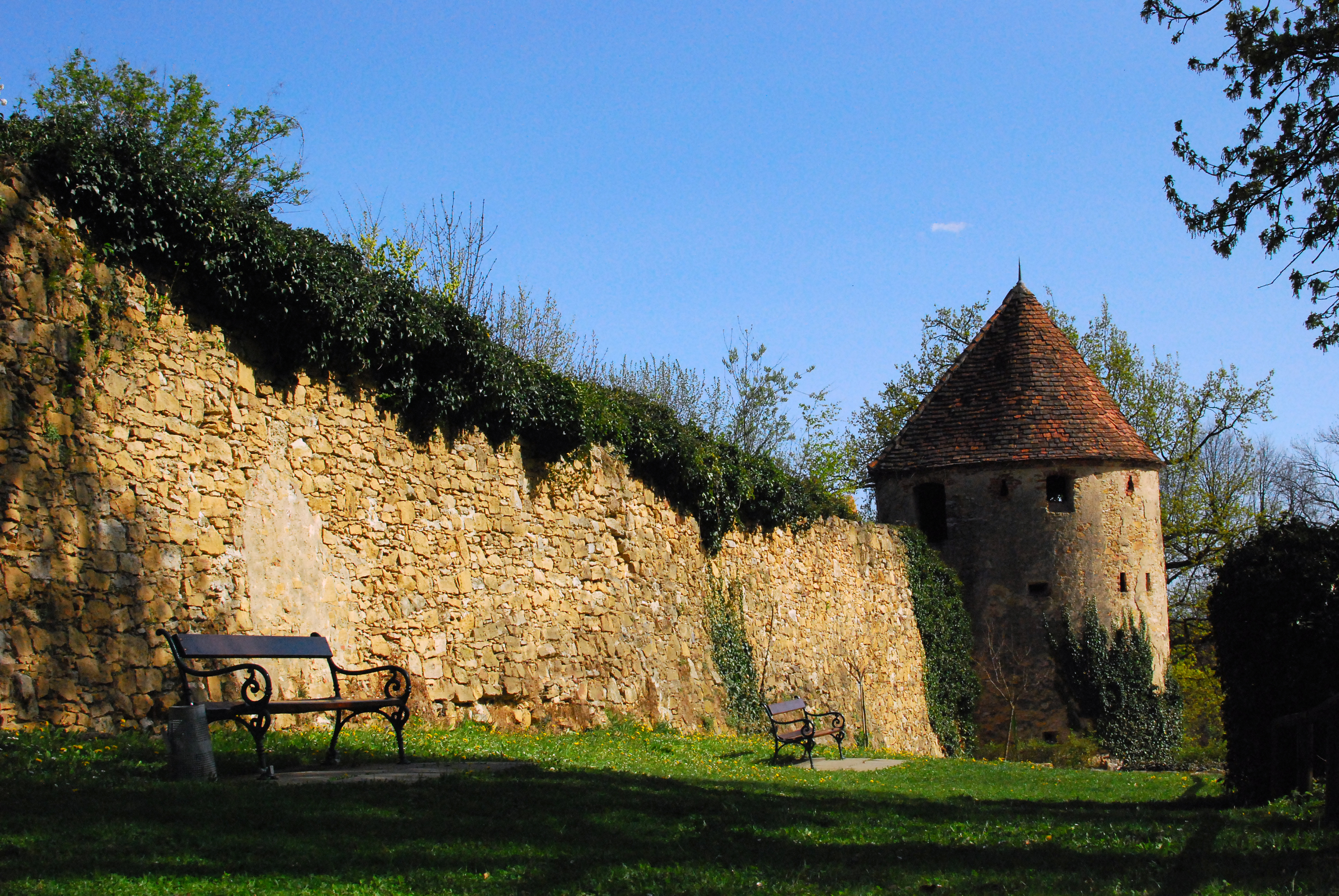 Stadtmauer Hartberg